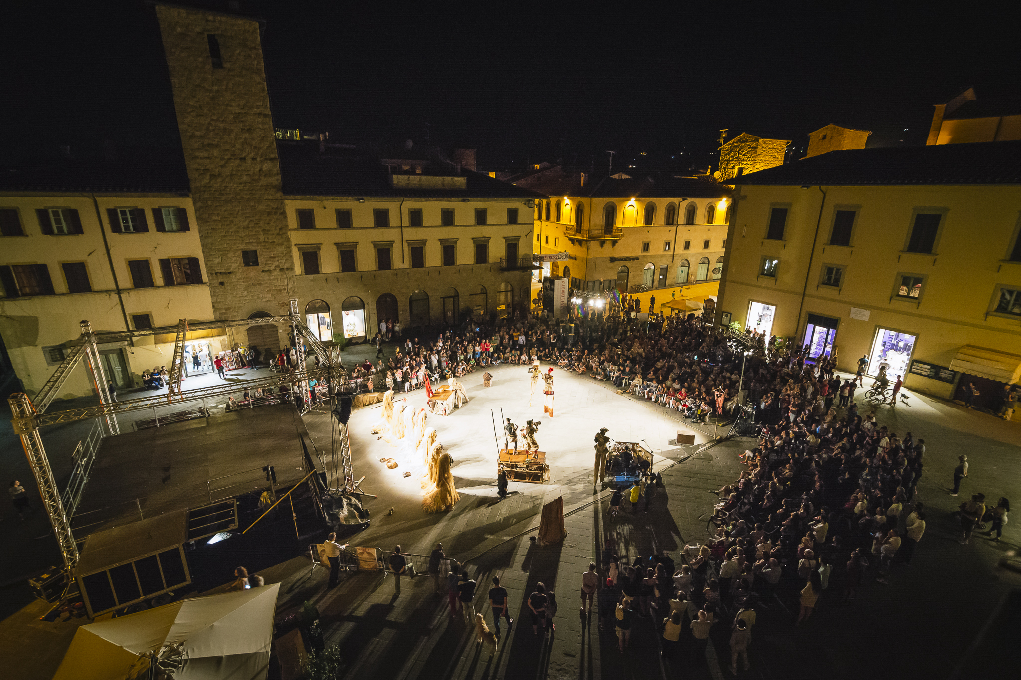 Piazza Torre di Berta a Sansepolcro, durante Kilowatt Festival 2016